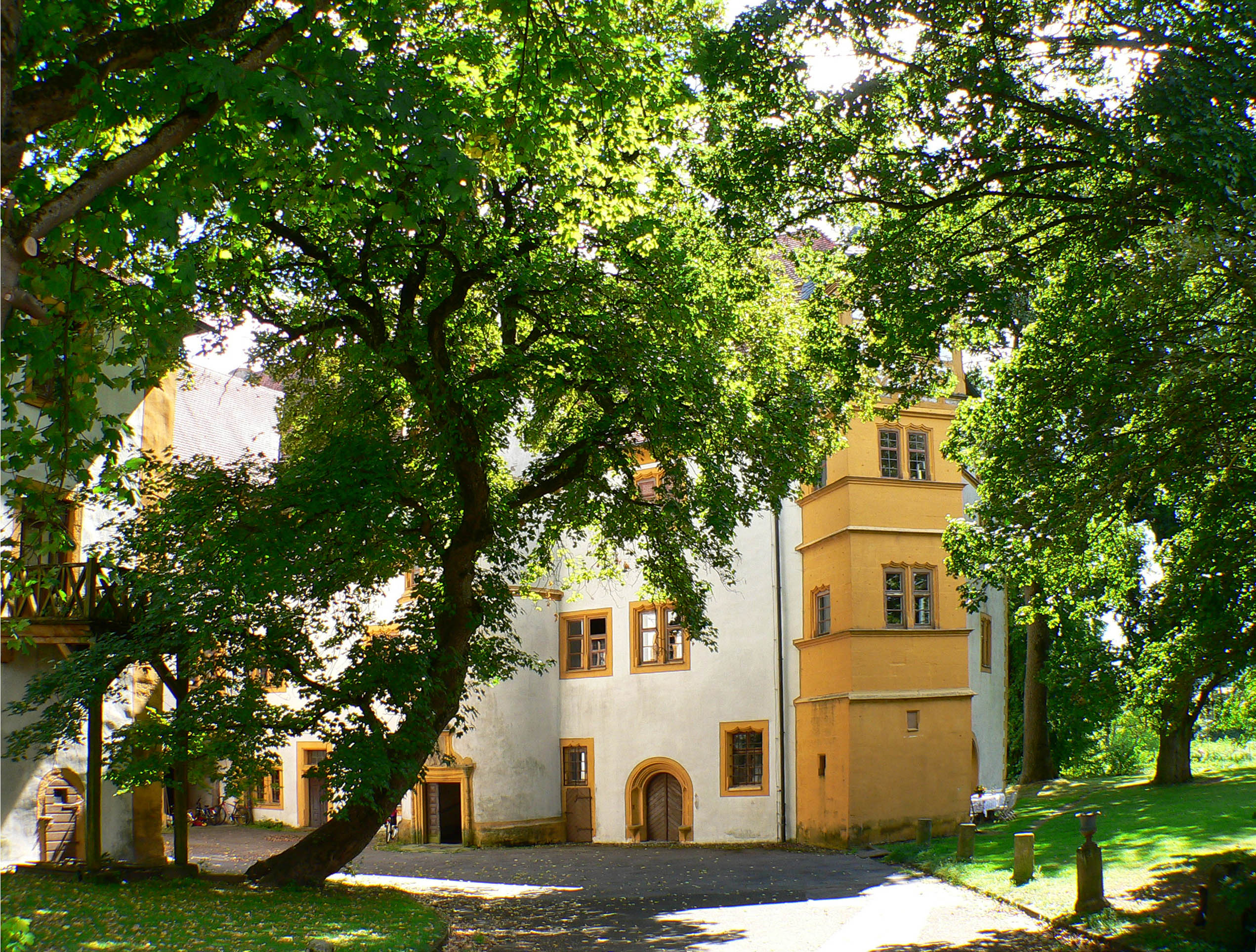 Rittergut Bundorf in Bundorf, Landkreis Haßberge, Bayern